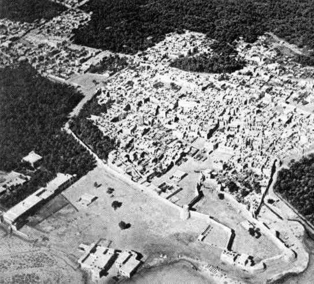 منظر جوّيّ لمنازل قلعة القطيف في خمسينيات القرن العشرين.